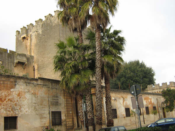 fatta da me, la torre quadrata del castello di san vito